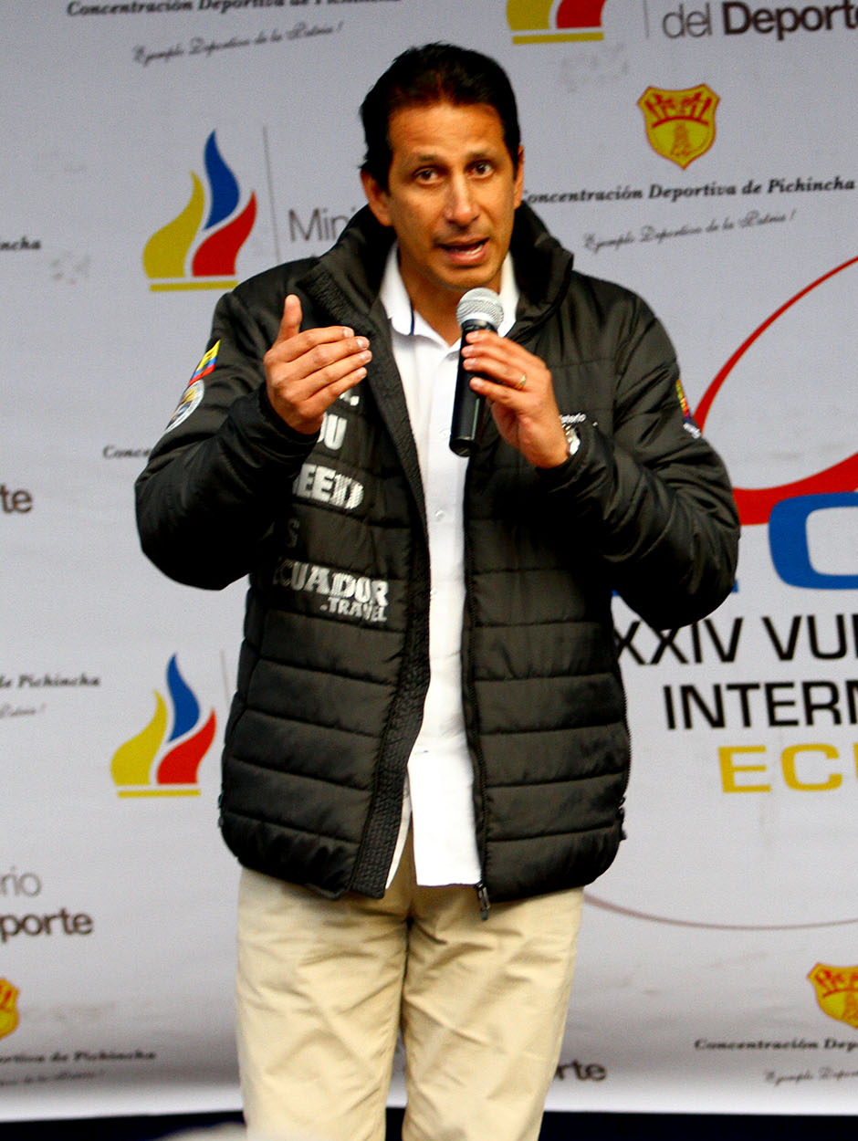 Tulcán, 07 de oct de 2014 (Andes).- Vuelta Ciclítica Internacional al Ecuador 2014. Foto: Luis Astudillo C. / Andes